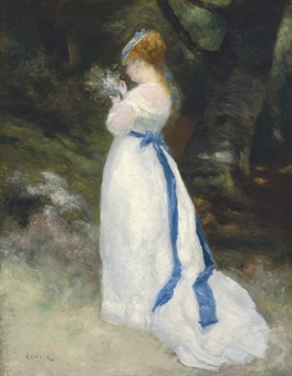 Portrait de Lise (Lise tenant un bouquet de fleurs des champs)